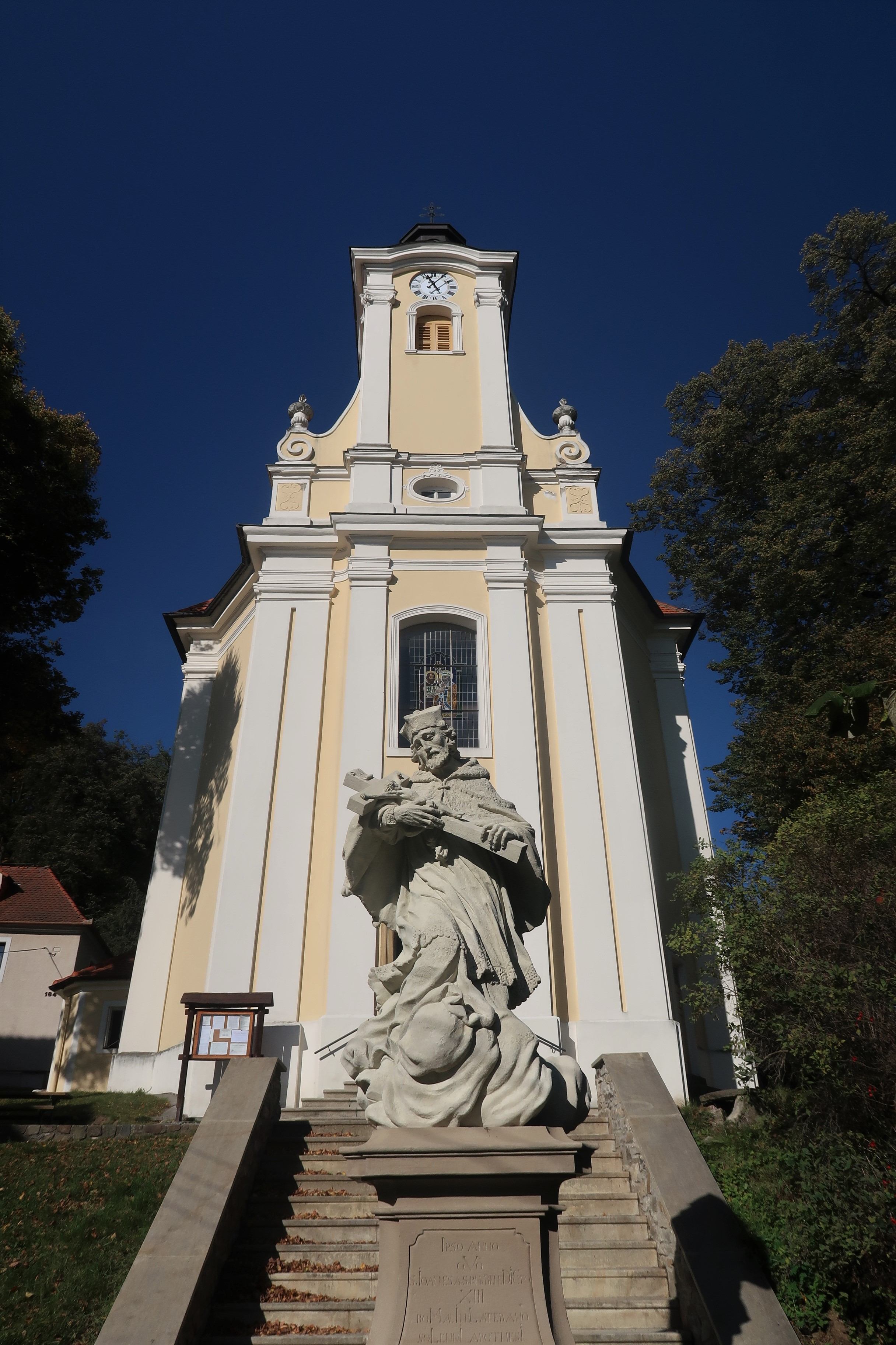 Luleč, okres Vyškov, barokní kostel sv. Isidora (1739) se sochou sv. Jana Nepomuckého